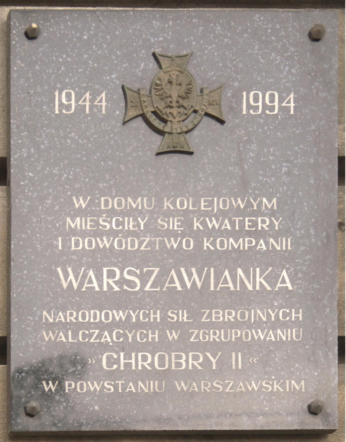 Tablica na Domu Kolejarza, upamiętniająca walkę Kompanii Warszawianka.